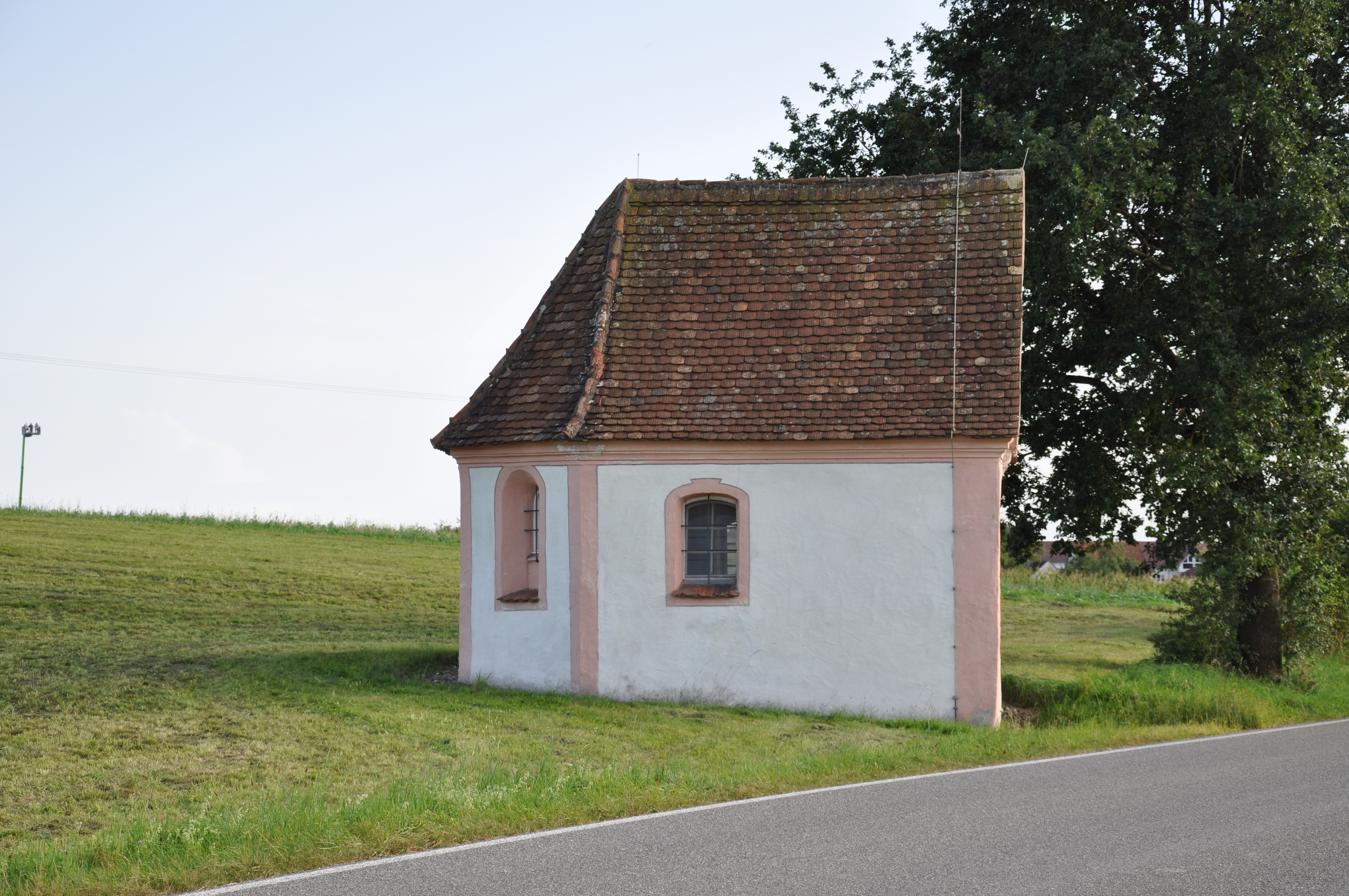 Kapelle St. Leonhard, Michelwinnaden, Stadt Bad Waldsee